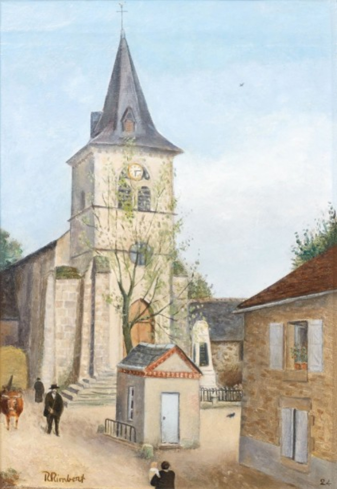 Huile de René Rimbert, 1924, Eglise de Perpezac le Noir ... au premier plan de dos, Denise et Camille, son épouse et sa fille